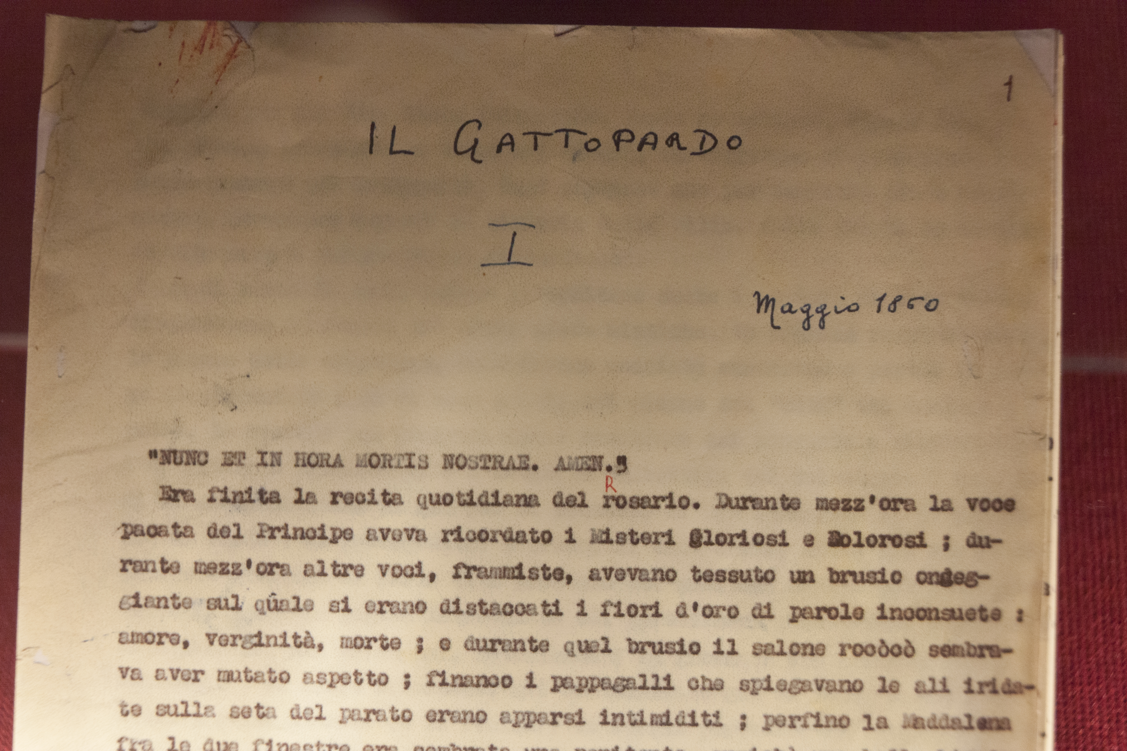 Incipit dattiloscritto Gattopardo